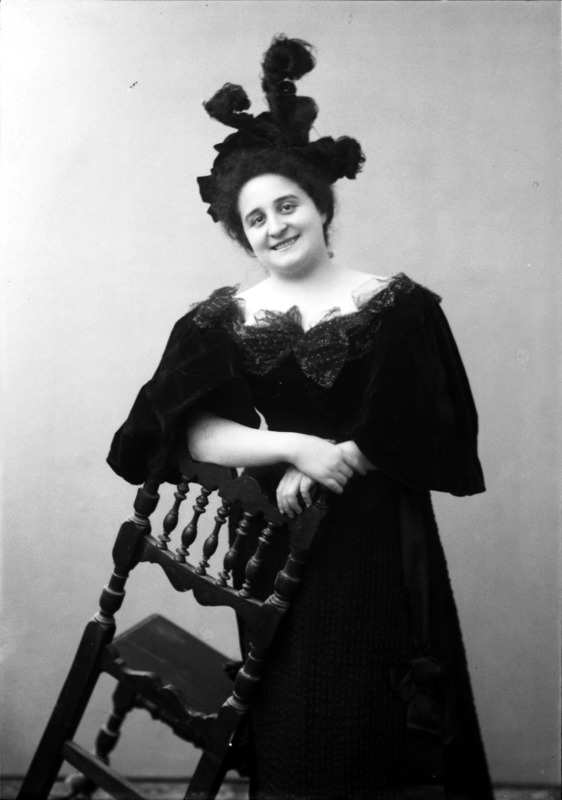 Ida Carloni Talli